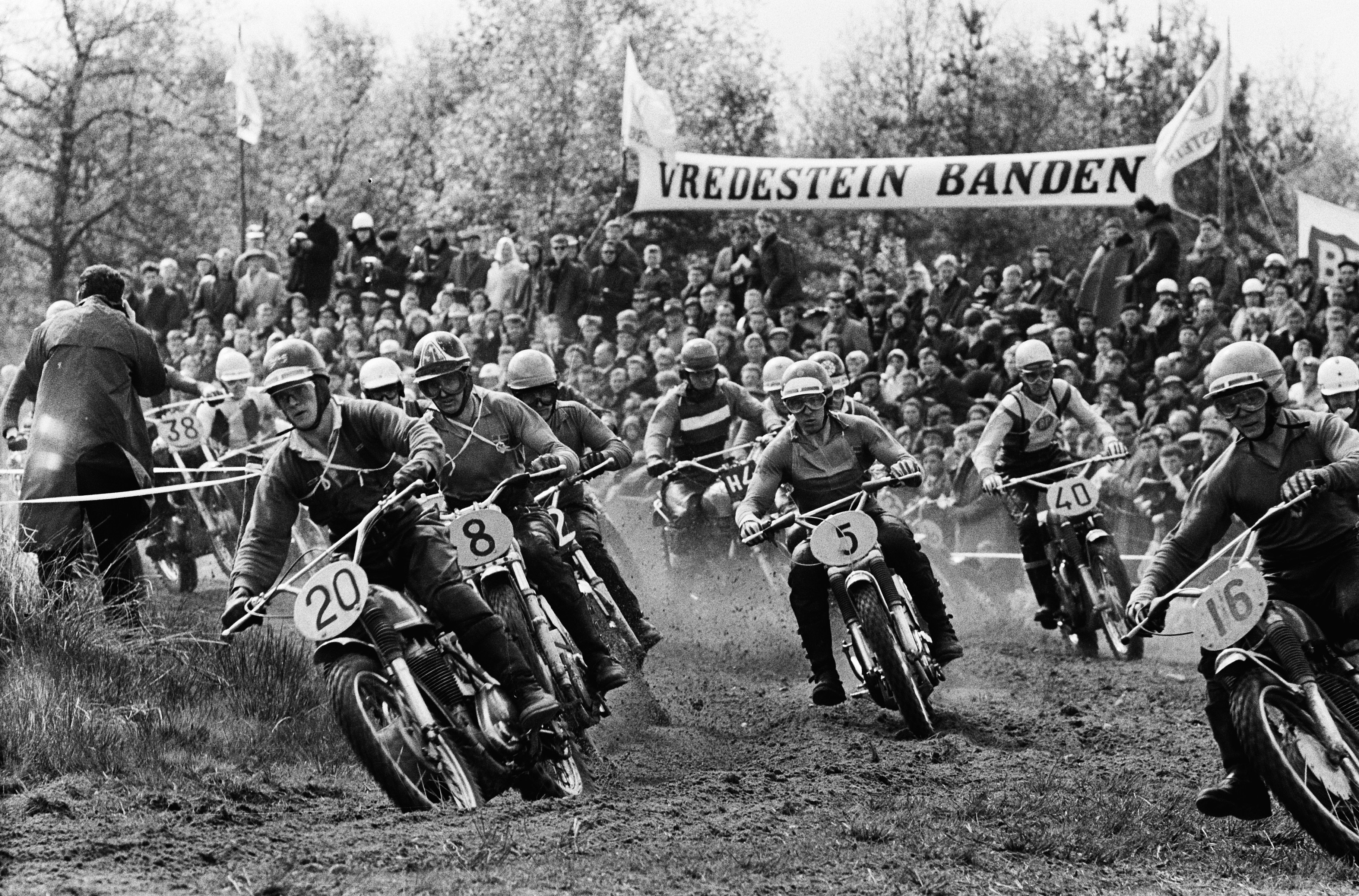 Collectie / Archief : Fotocollectie Anefo Reportage / Serie : [ onbekend ] Beschrijving : Internationale Motor-Cross Grand Prix 1963 in Markelo verreden. De 500 cc interenationale in de bocht v.l.n.r nr. 20 V. Eastwood (Eng), nr. 8 S. Lundin Datum : 19 mei 1963 Locatie : Markelo Trefwoorden : Motorcross Persoonsnaam : S. Lundin, V. Eastwood Fotograaf : Pot, Harry / Anefo Auteursrechthebbende : Nationaal Archief Materiaalsoort : Negatief (zwart/wit) Nummer archiefinventaris : bekijk toegang 2.24.01.05 Bestanddeelnummer : 915-1787